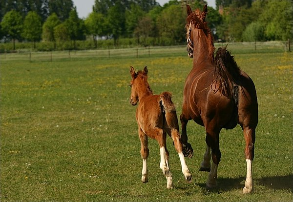 Merrie en veulen, beiden voskleurig, in galop